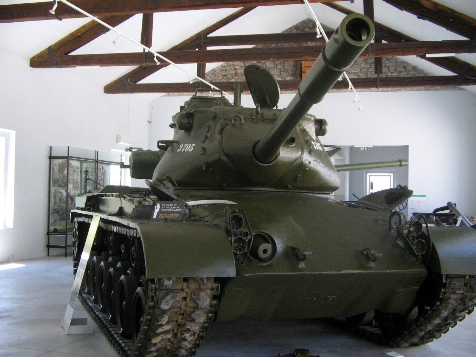 Park of Military History, Pivka, Slovenija